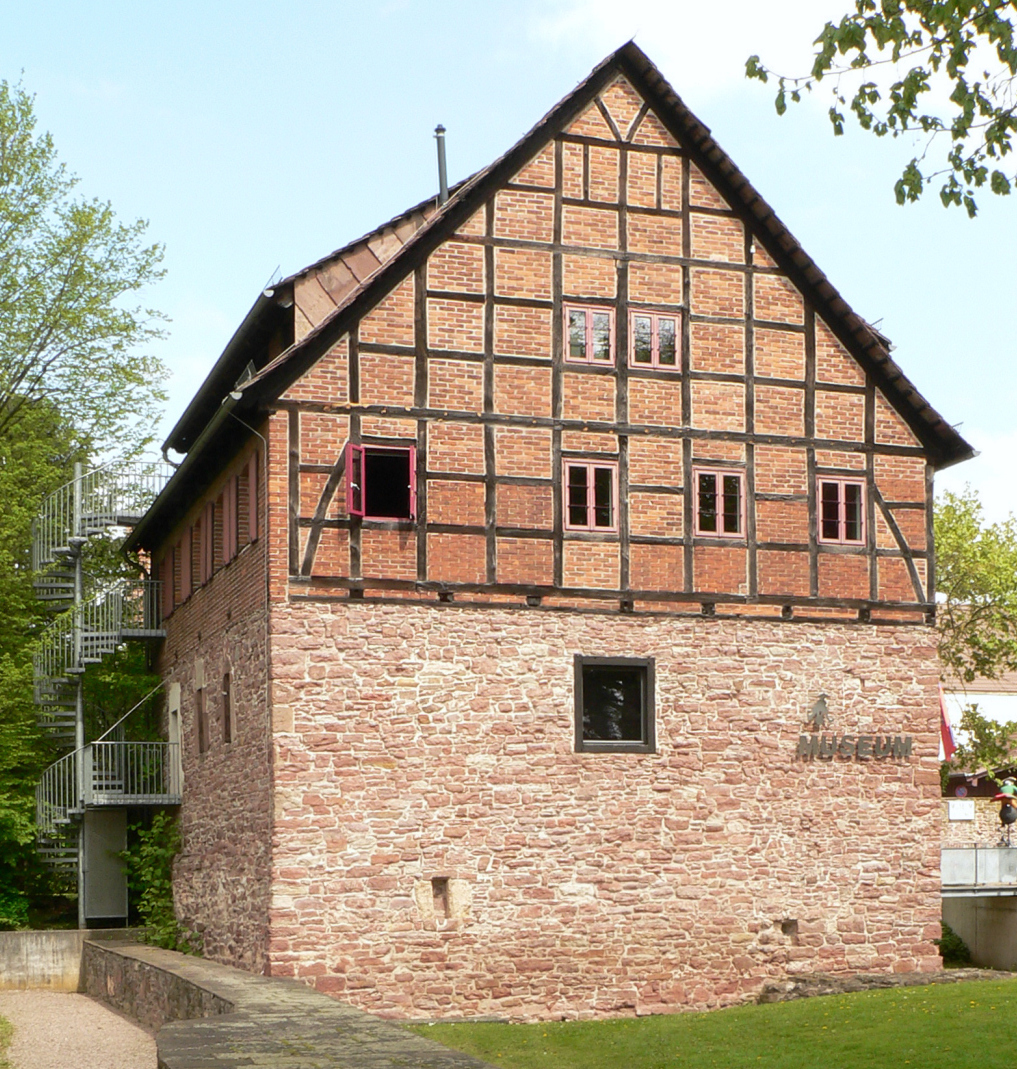 Münchhausen Museum in Bodenwerder